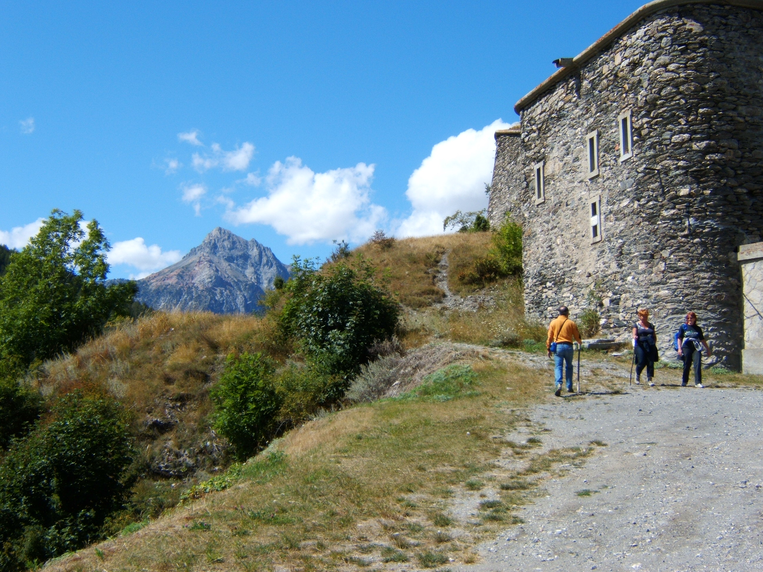 Il forte Bramafam a Bardonecchia